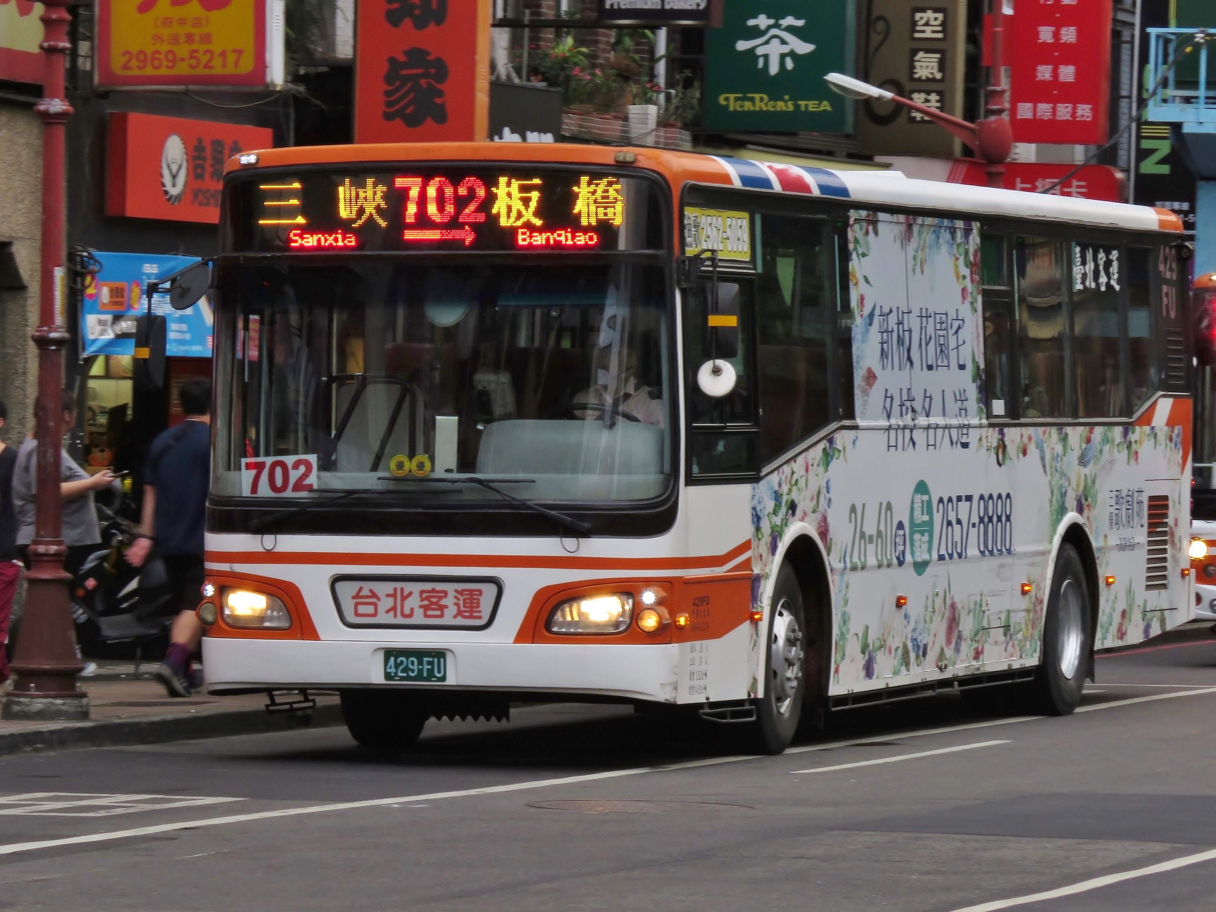 臺北客運2010年HINO RK8JRSA大客車429-FU702路 三峽→板橋